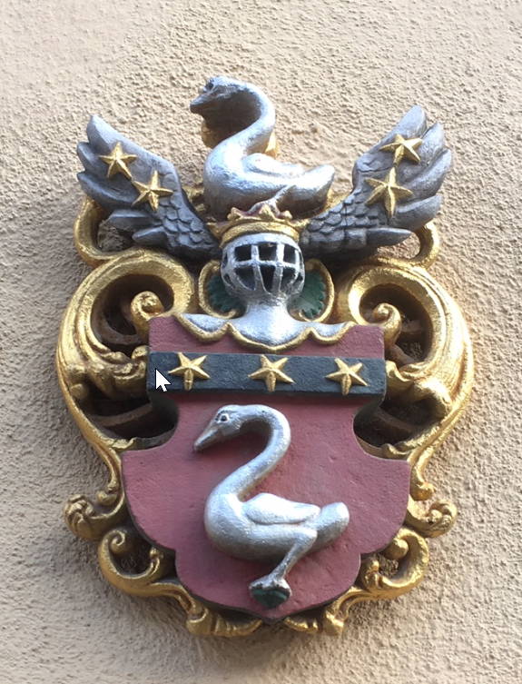 Wappen der Freiherren von Fick am Fickschen Schloss zu Angeltürn über dem Eingang zur katholischen Kirche (die sich im Schloss befindet)